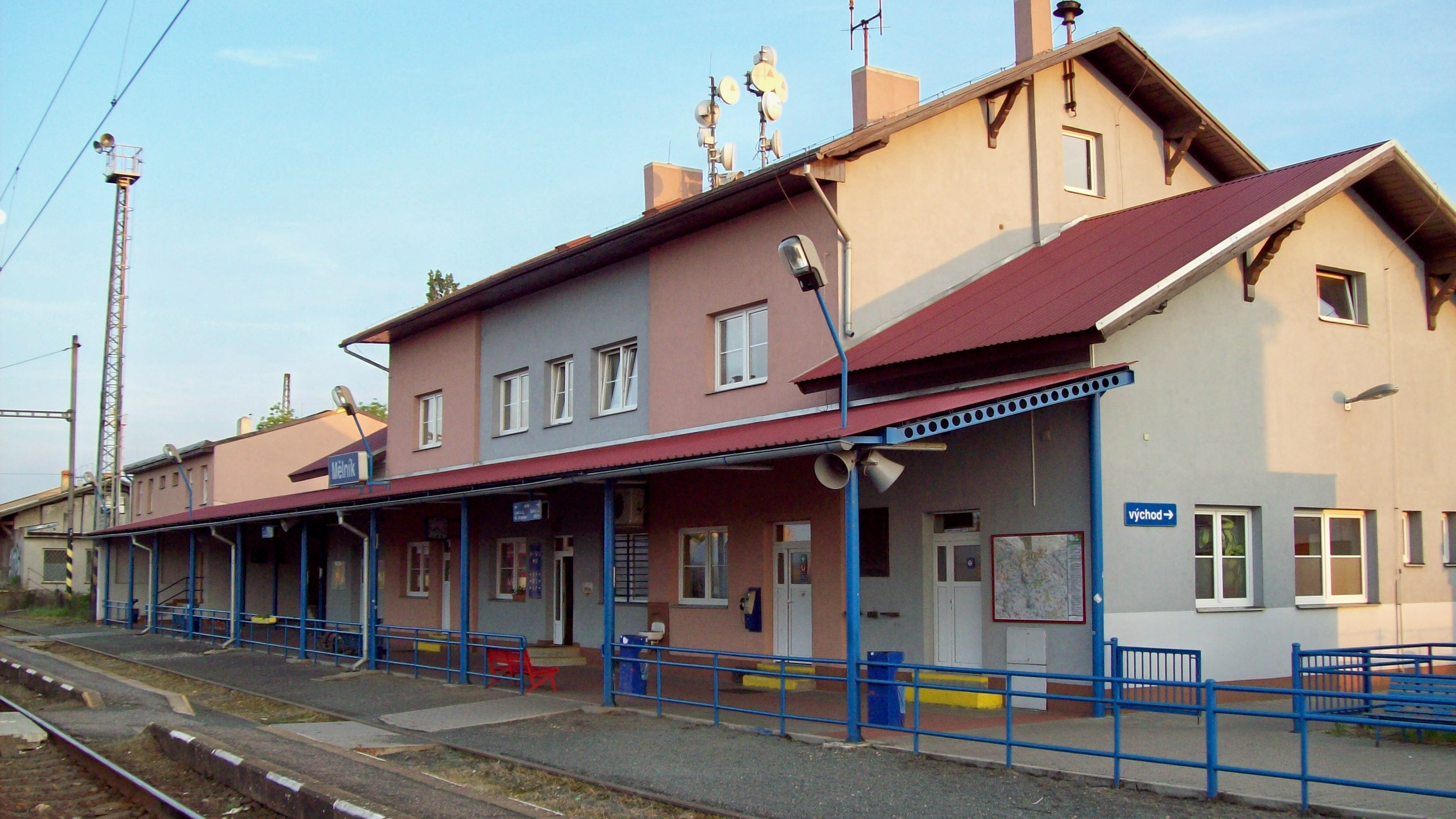 Vlakové nádraží v Mělníku, ul. Nádražní 2004.